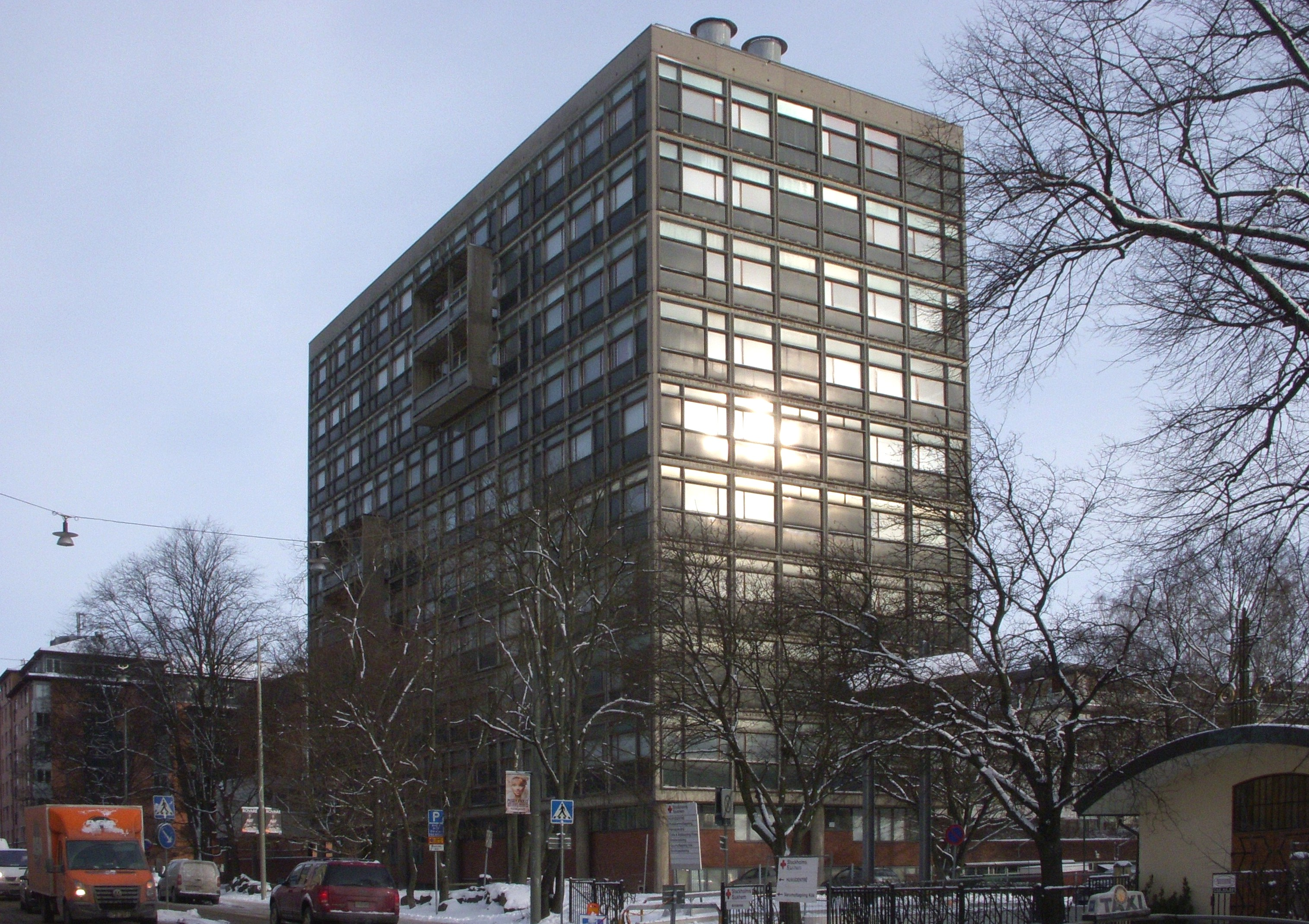 S:t Görans Gymnasium, Stockholm, arkitekt Léonie Geisendorf